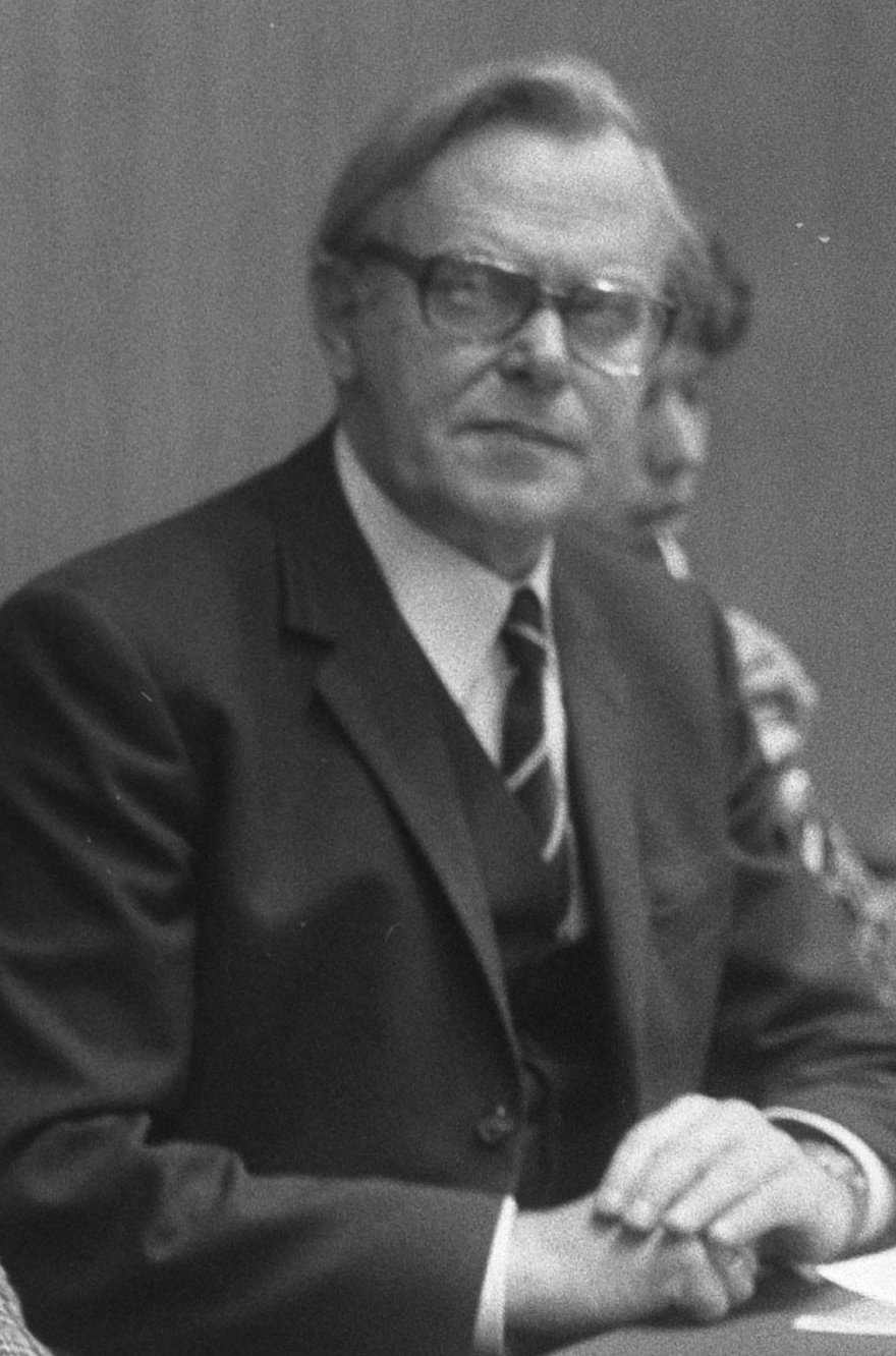 Collectie / Archief : Fotocollectie Anefo Reportage / Serie : Congres van de Vereniging voor Calvinistische Wijsbegeerte in de RAI Beschrijving : Prof. dr. H. van Riessen Datum : 2 januari 1974 Locatie : Amsterdam, Noord-Holland Trefwoorden : congrescentra, congressen, filosofen Persoonsnaam : Riessen H. van Instellingsnaam : RAI Fotograaf : Fotograaf Onbekend / Anefo Auteursrechthebbende : Nationaal Archief Materiaalsoort : Negatief (zwart/wit) Nummer archiefinventaris : bekijk toegang 2.24.01.05 Bestanddeelnummer : 926-9118